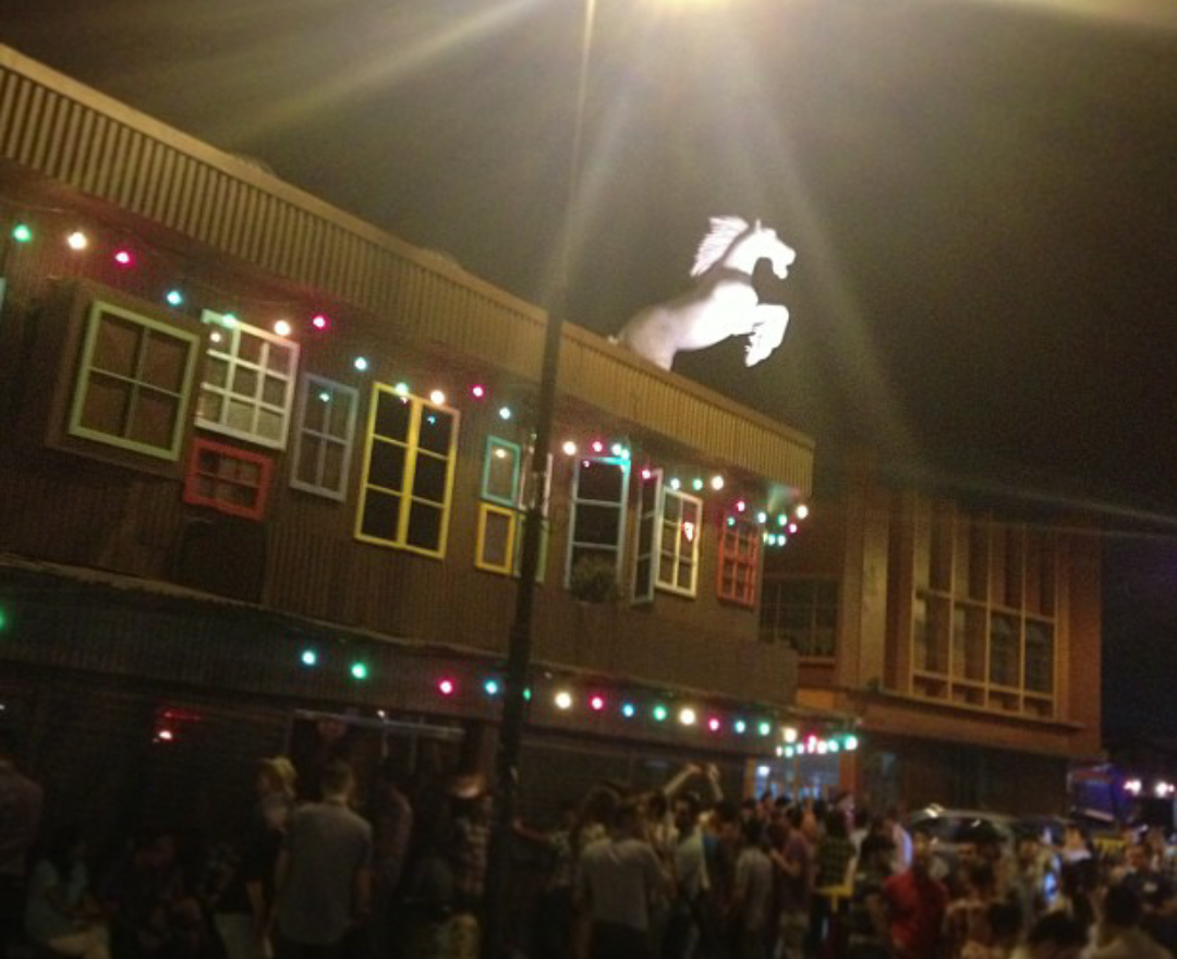 Año nuevo chino en San José